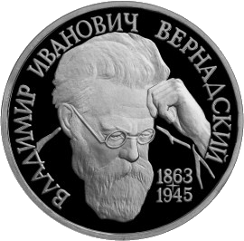 130-летие со дня рождения В.И.Вернадского